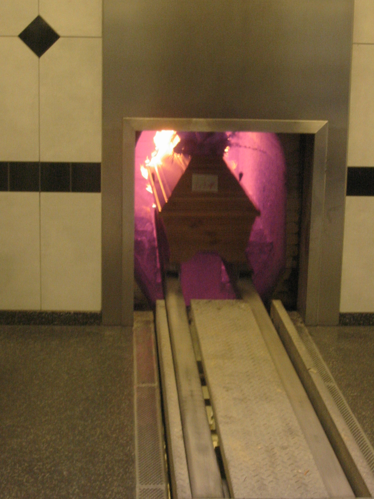 Einfahrt des Sarges in den Kremationsofen